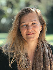 Loredana De Petris